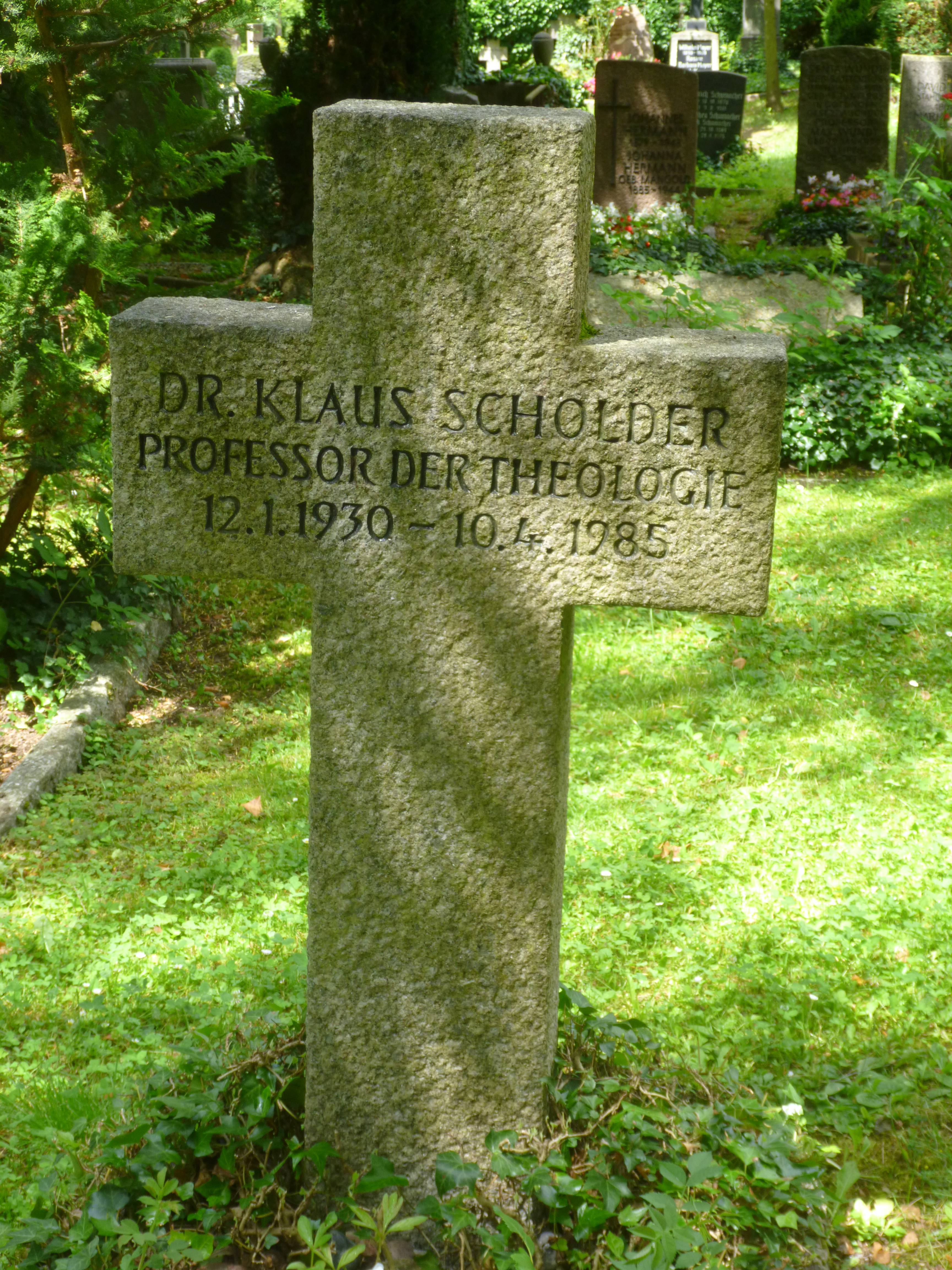 Klaus Scholder Stadtfriedhof Tübingen